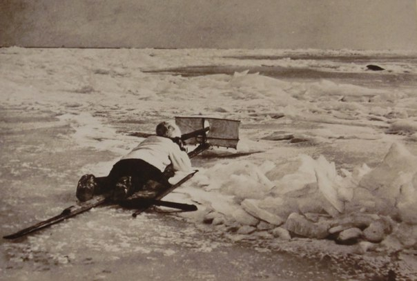 Фото из фонда Российского этнографического музея